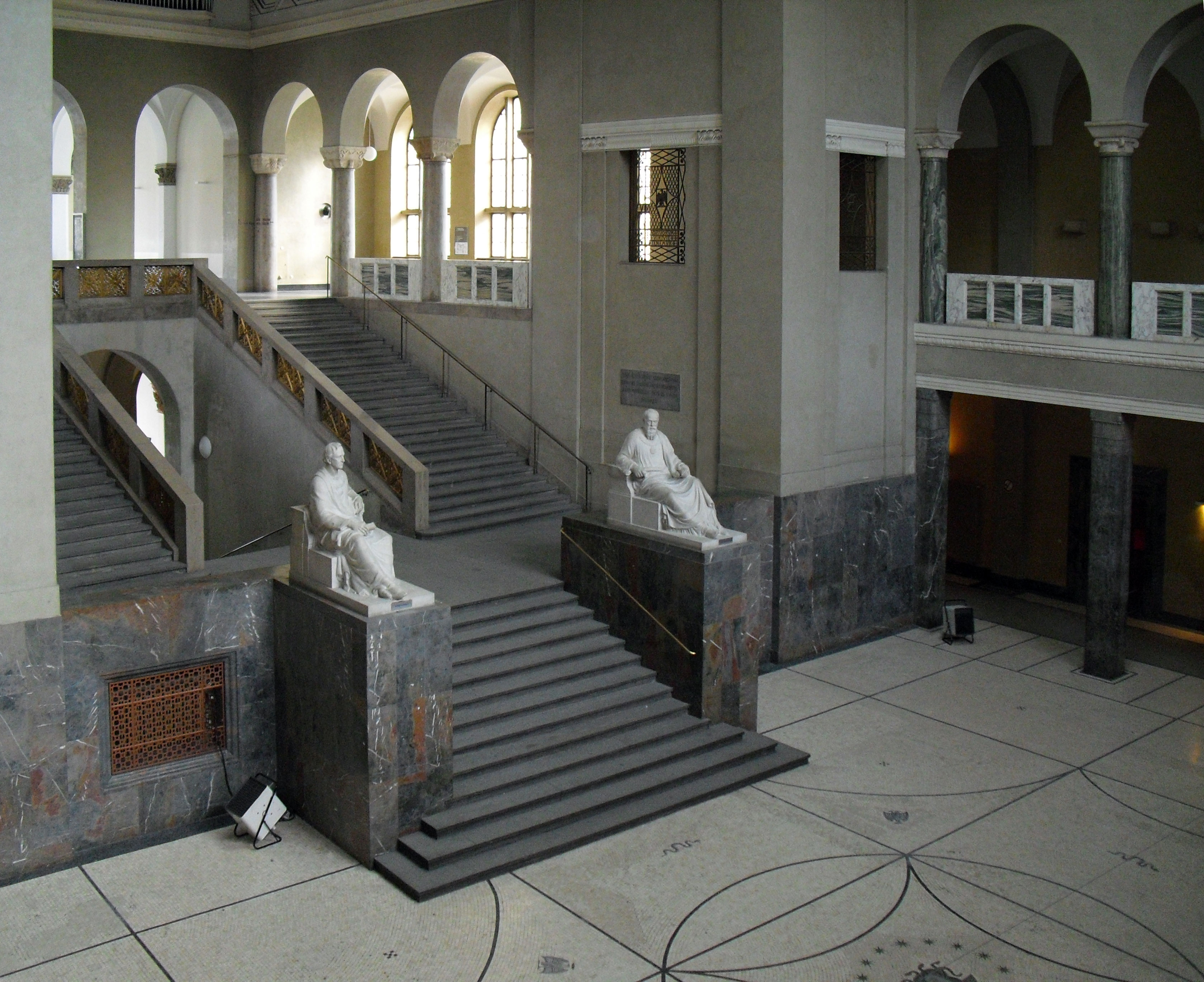 Treppe im Lichthof der Ludwig-Maximilians-Universität München